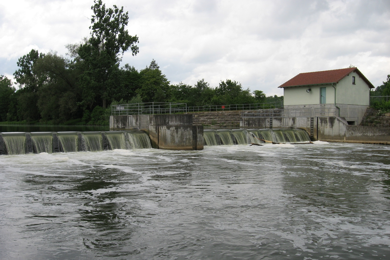 Neckarwehr bei Neckartailfingen, Entnahmestelle der Filderwasserversorgung